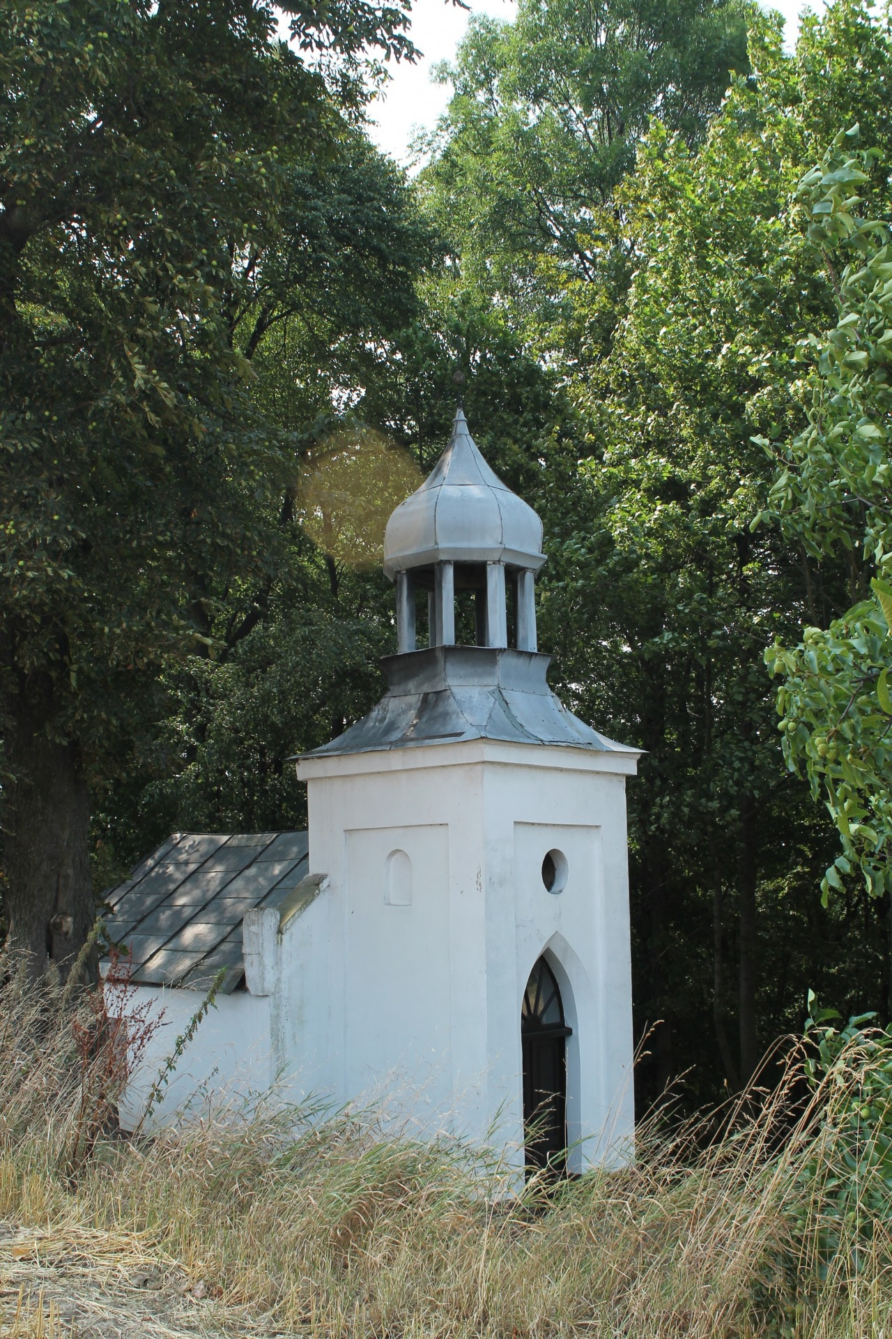 Rudziczka, kapliczka I, koniec XVIII w. – widok na elewację pn i zach., fot. J. Szot 2015, zbiory NID. 10.1959.